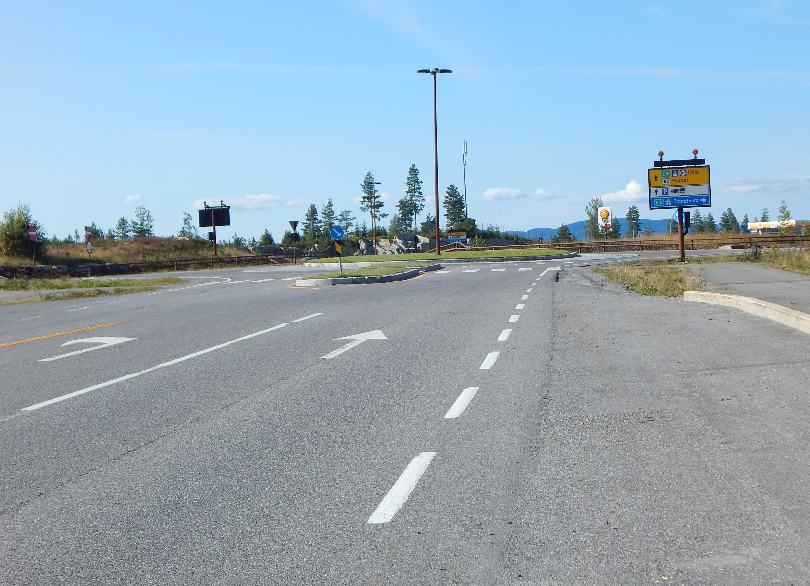 Fylkesvei 180 over E6 ved Nebbenes